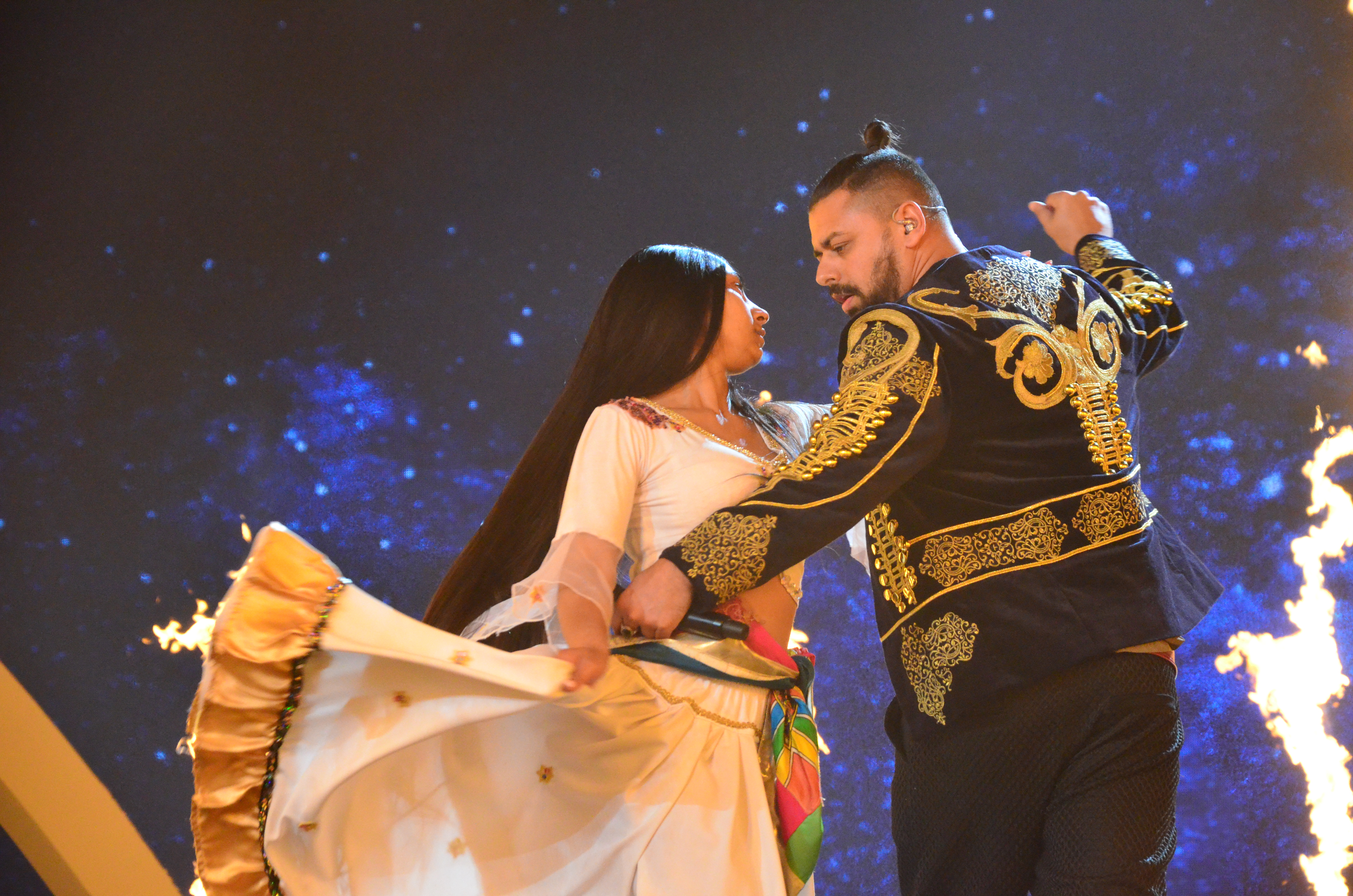 12 травня. Генеральна репетиція фіналу Євробачення 2017. Joci Pápai, Hungary